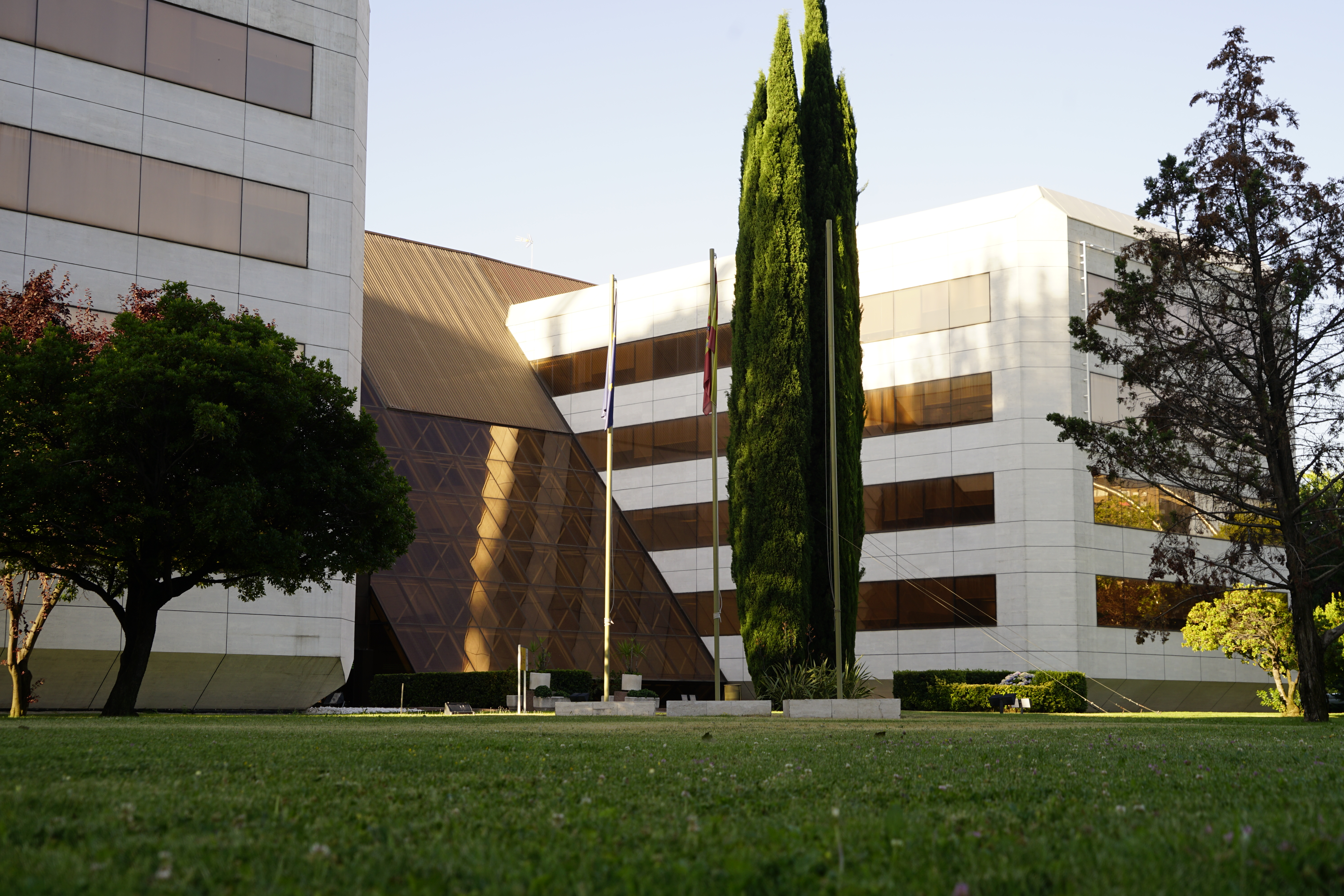 Logotipo Imserso